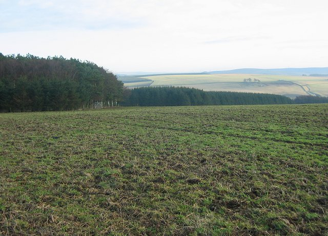 Fala Hill, above Falahill